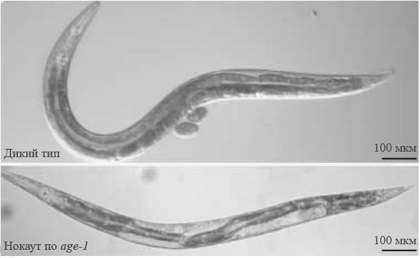 Взрослые нематоды - дикого типа (гермафродит; сверху) и с нокаутом гена age-1 (стерильная; снизу). Адаптировано для русской аудитории из Minaxi Gami and Catherine A. Wolkow, 2006.